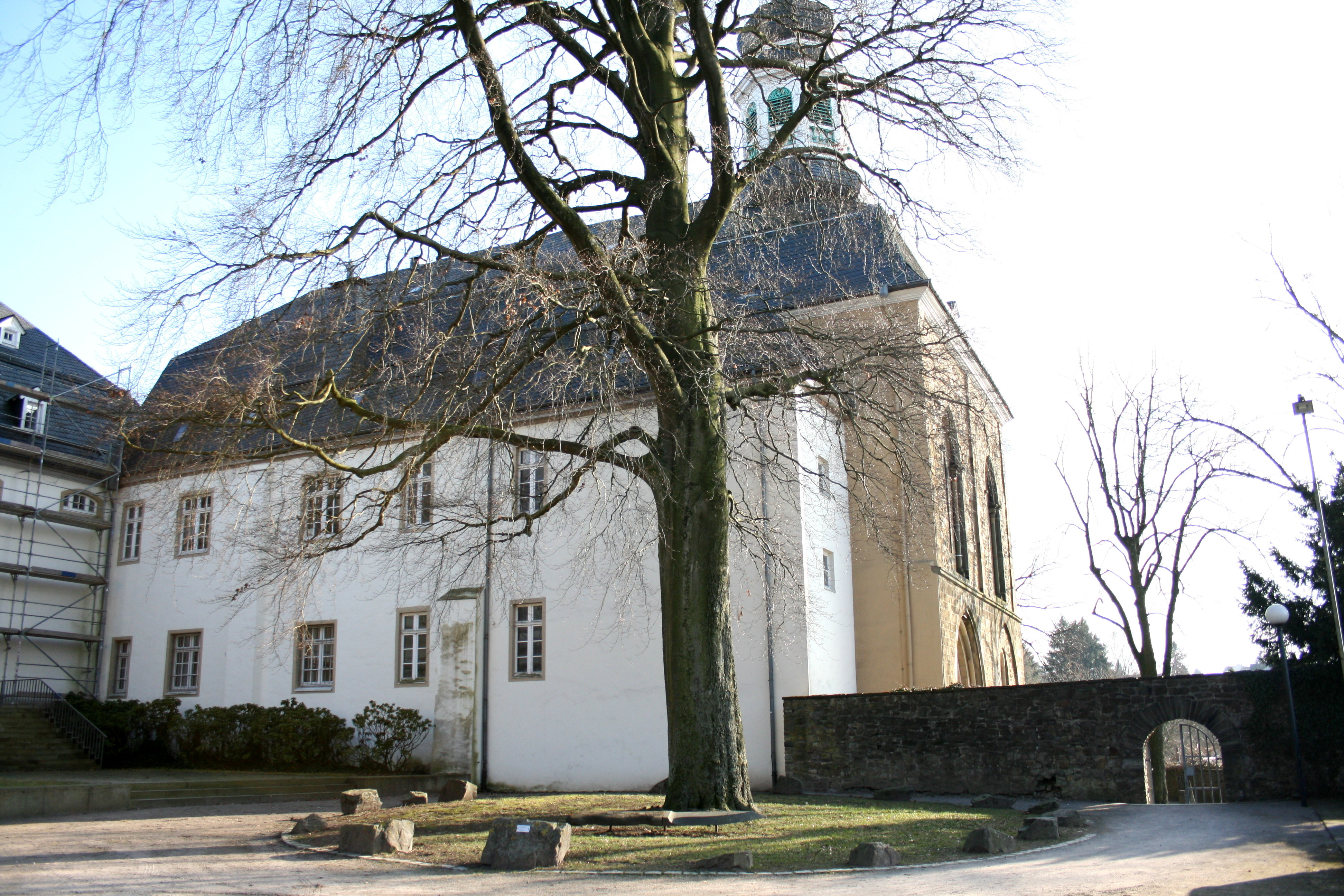 Deutsches Klingenmuseum in Solingen